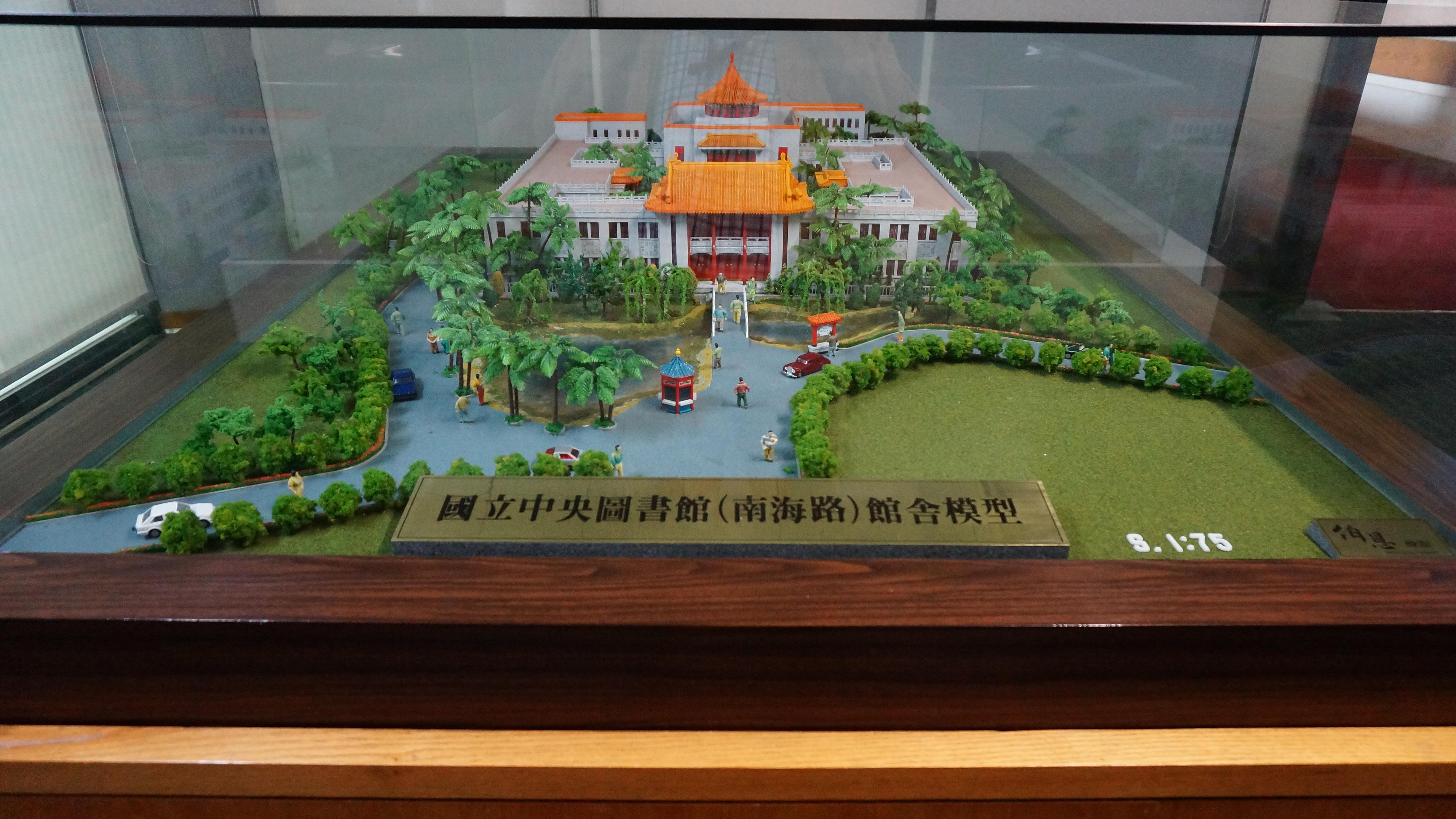 中華民國國立中央圖書館臺北市南海路館舍比例模型，比例為七十五分之一，展示於中華民國國家圖書館總館展覽室。